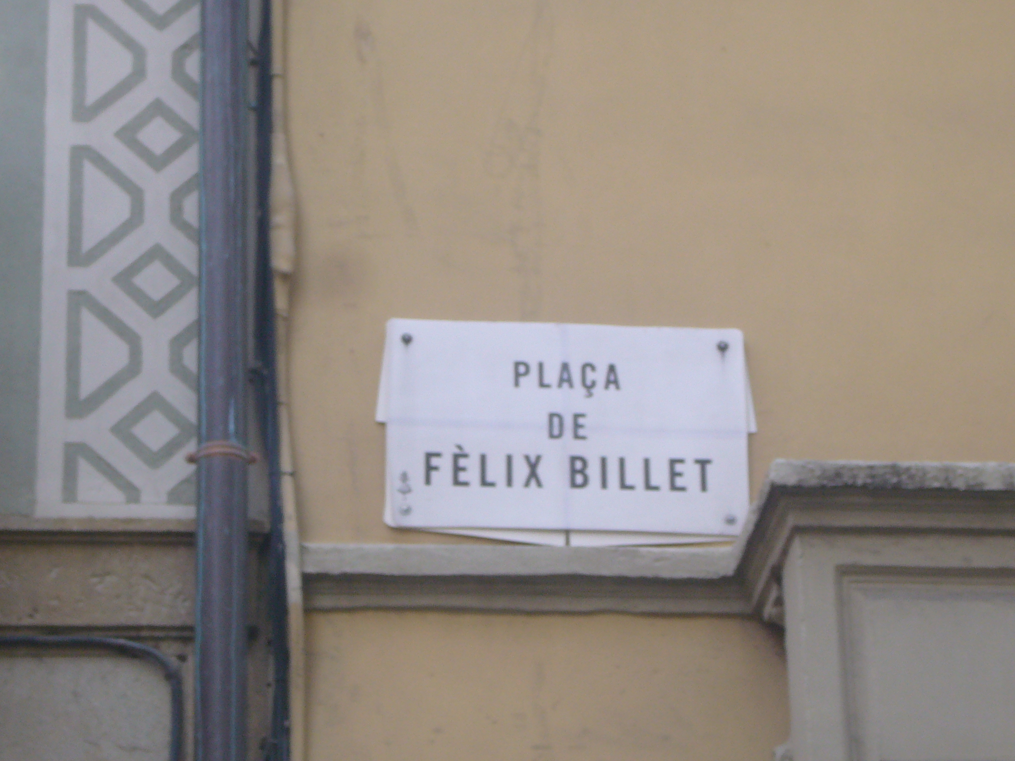 Placa "Felix Billet" a la plaça de Lluís Millet, col·locada a causa del desfalc de Felix Millet